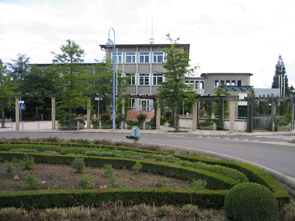 D'Gemengenhaus vun der Gemeng Suessem zu Bieles. Photo vum Pear 08:08, 30 August 2006 (UTC) 29.08.2006. Kategorie:Gemeng Suessem